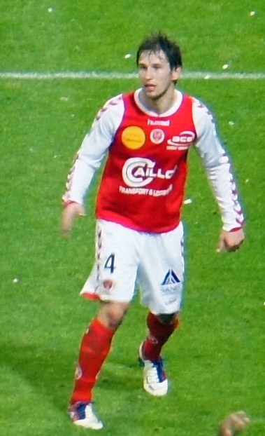 Grzegorz Krychowiak jouant au stade Delaune contre Brest, 2012.